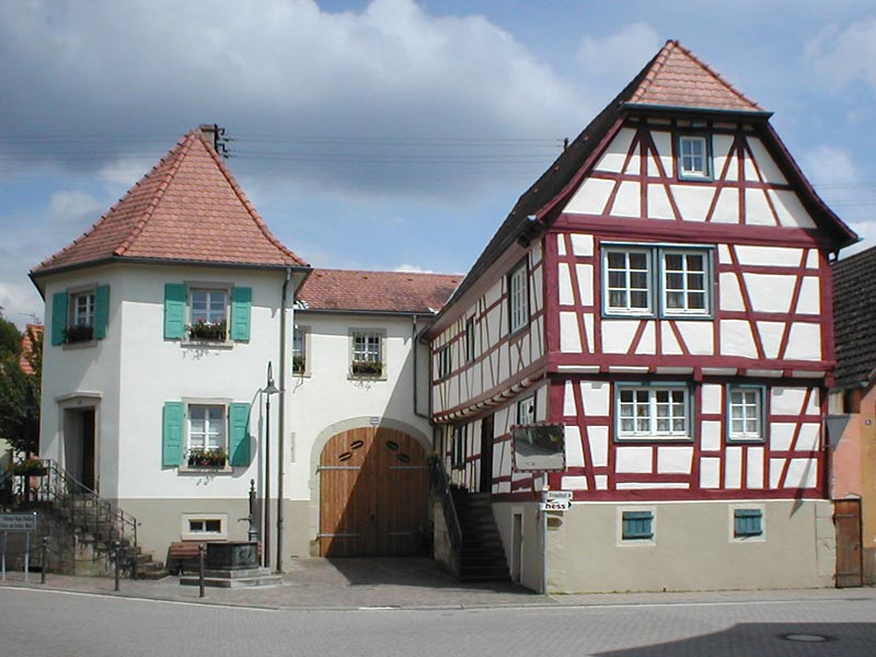 Gemmingensches Anwesen in Sinsheim-Hoffenheim